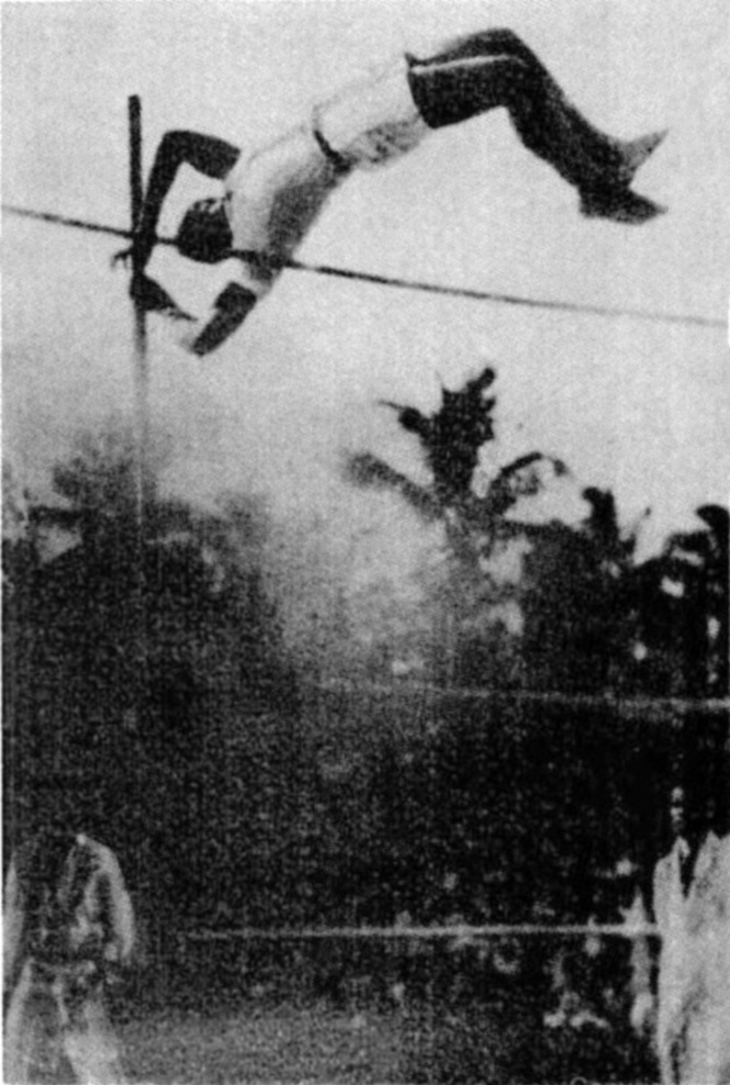 Siaosi Tāufaʻāhau Tupoulahi (later king Tāufaʻāhau Tupou IV of Tonga) was a keen sportsman when young.